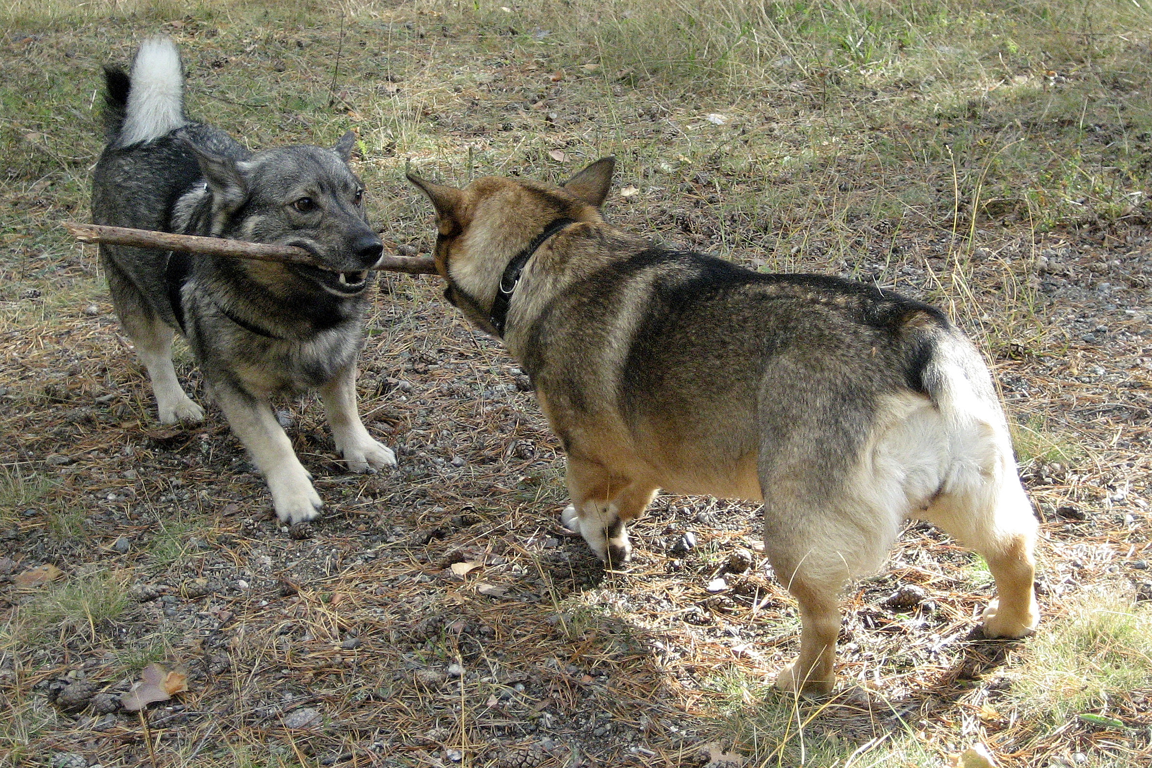 Västgötaspetsar